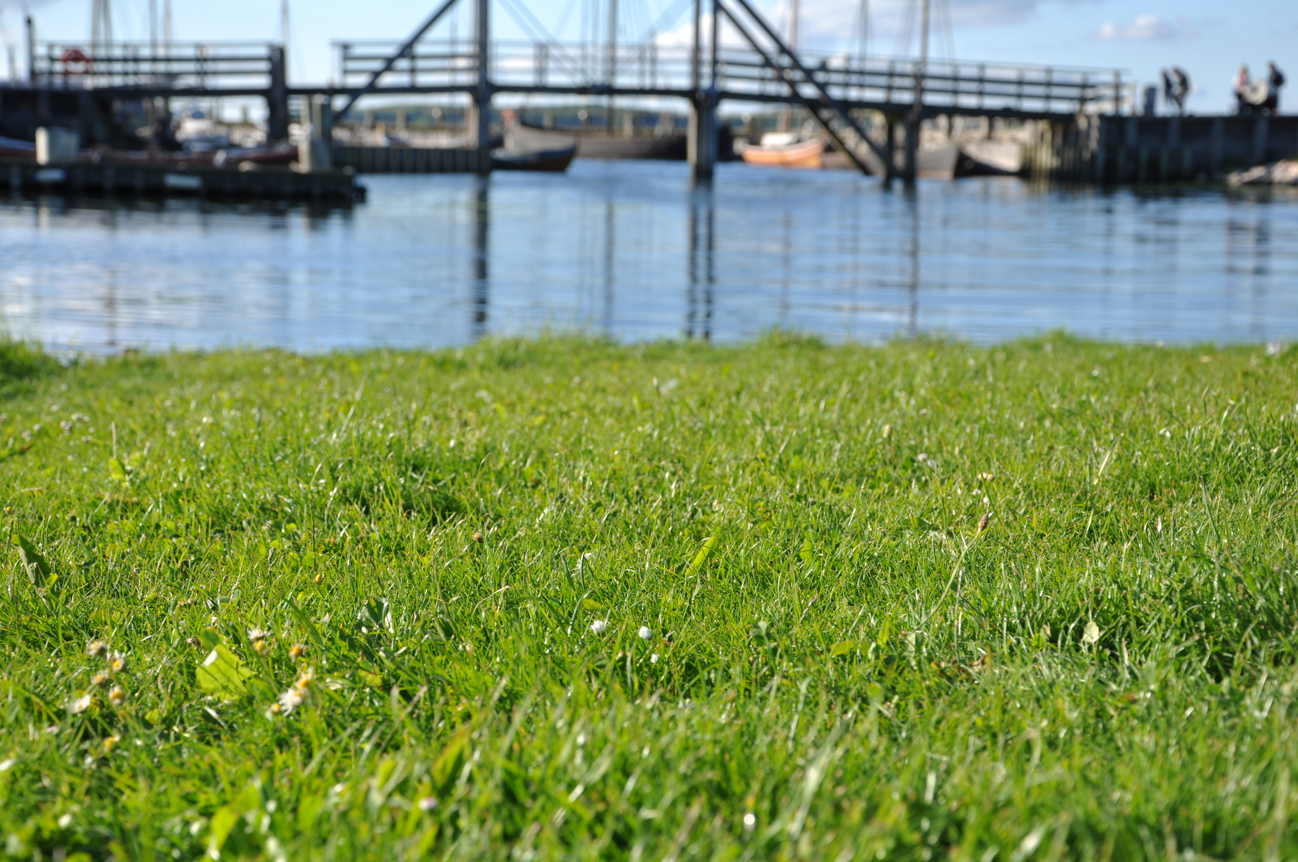 Græs nær Vikingeskibs museet i Roskilde, Danmark.